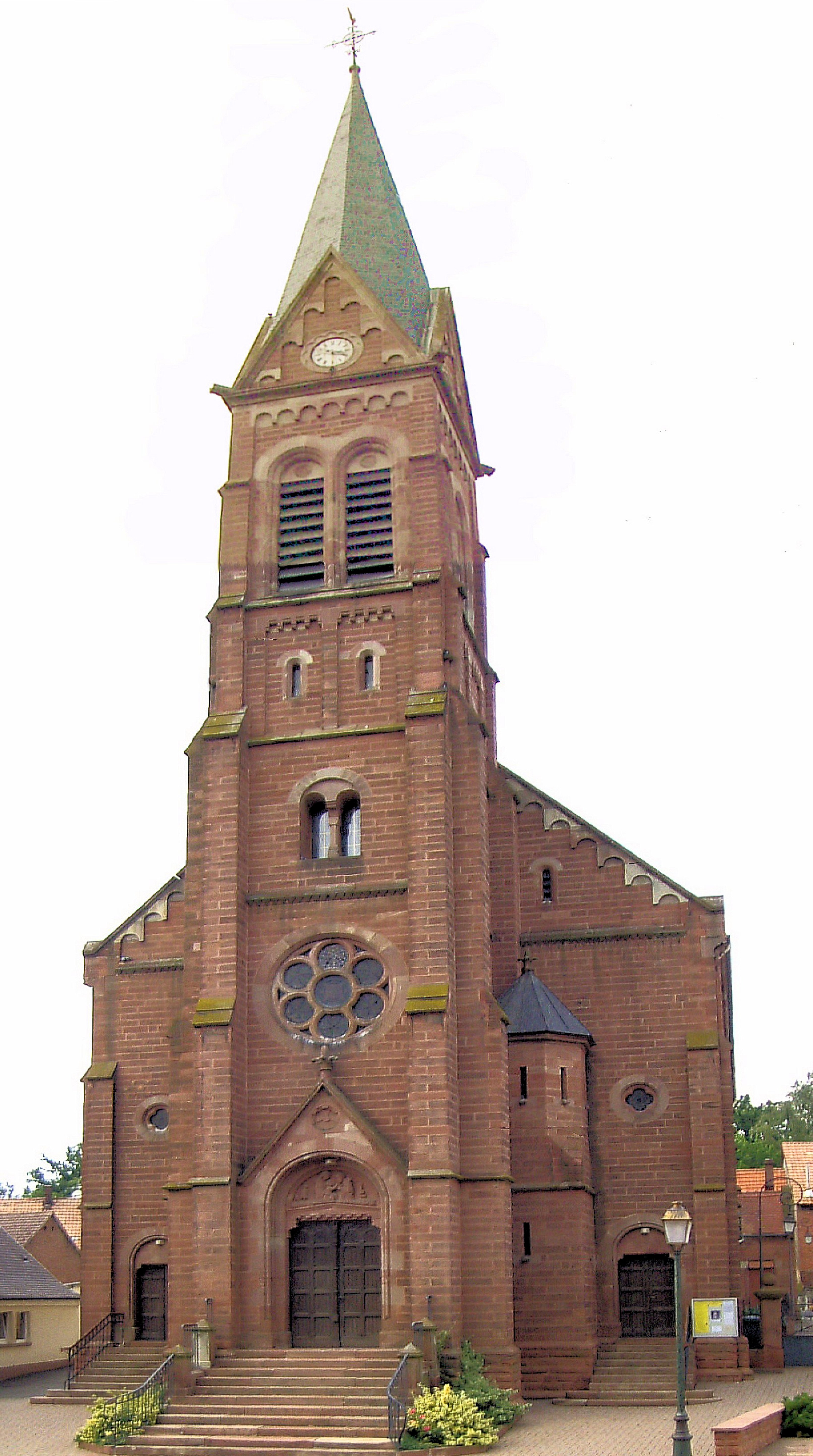 L'église Saint-Nabor d'Ettendorf